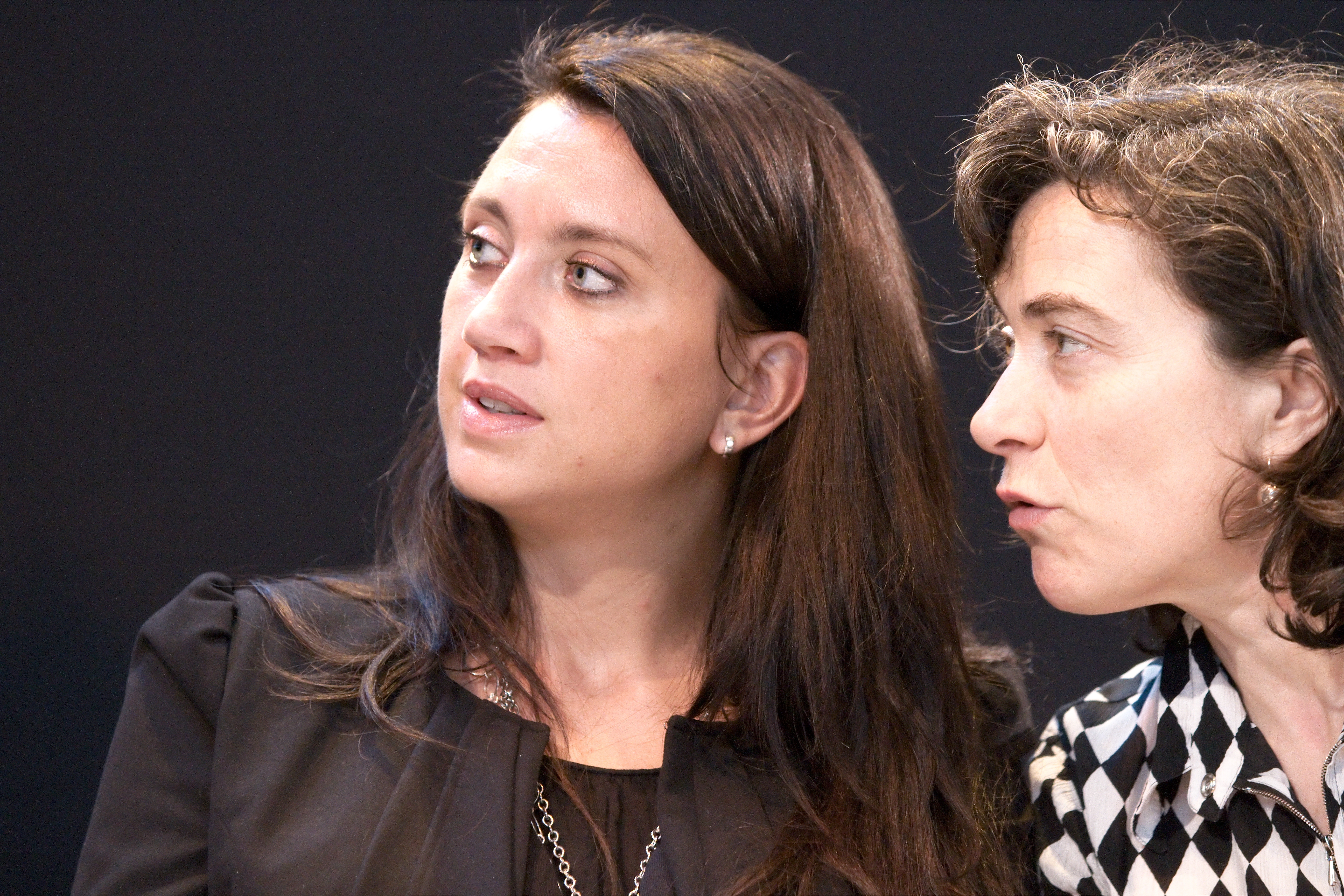 Camilla Läckberg et sa traductrice au Salon du livre de Paris lors de la conférence Le Polar comme forme d'expression.